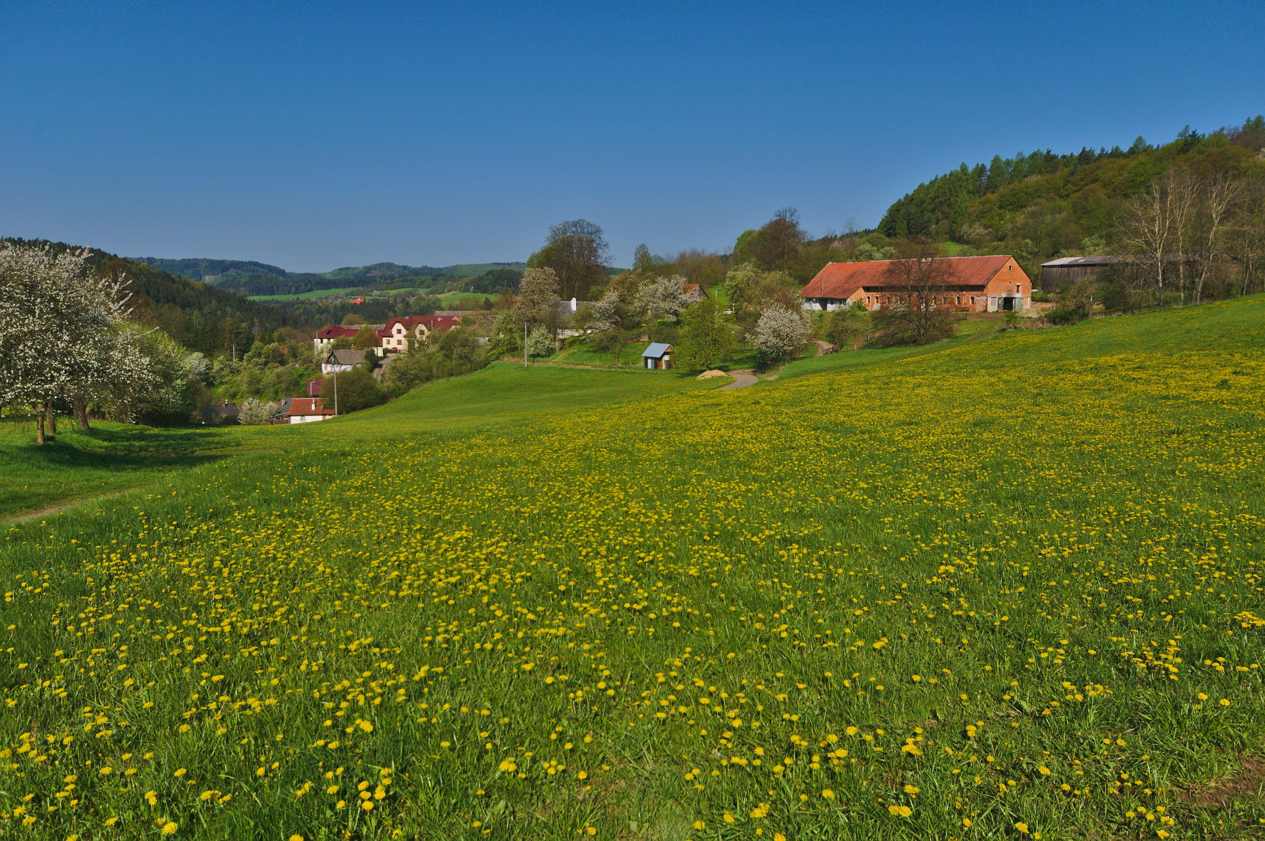 Pohled na obec od východu, Lhota u Olešnice, okres Blansko